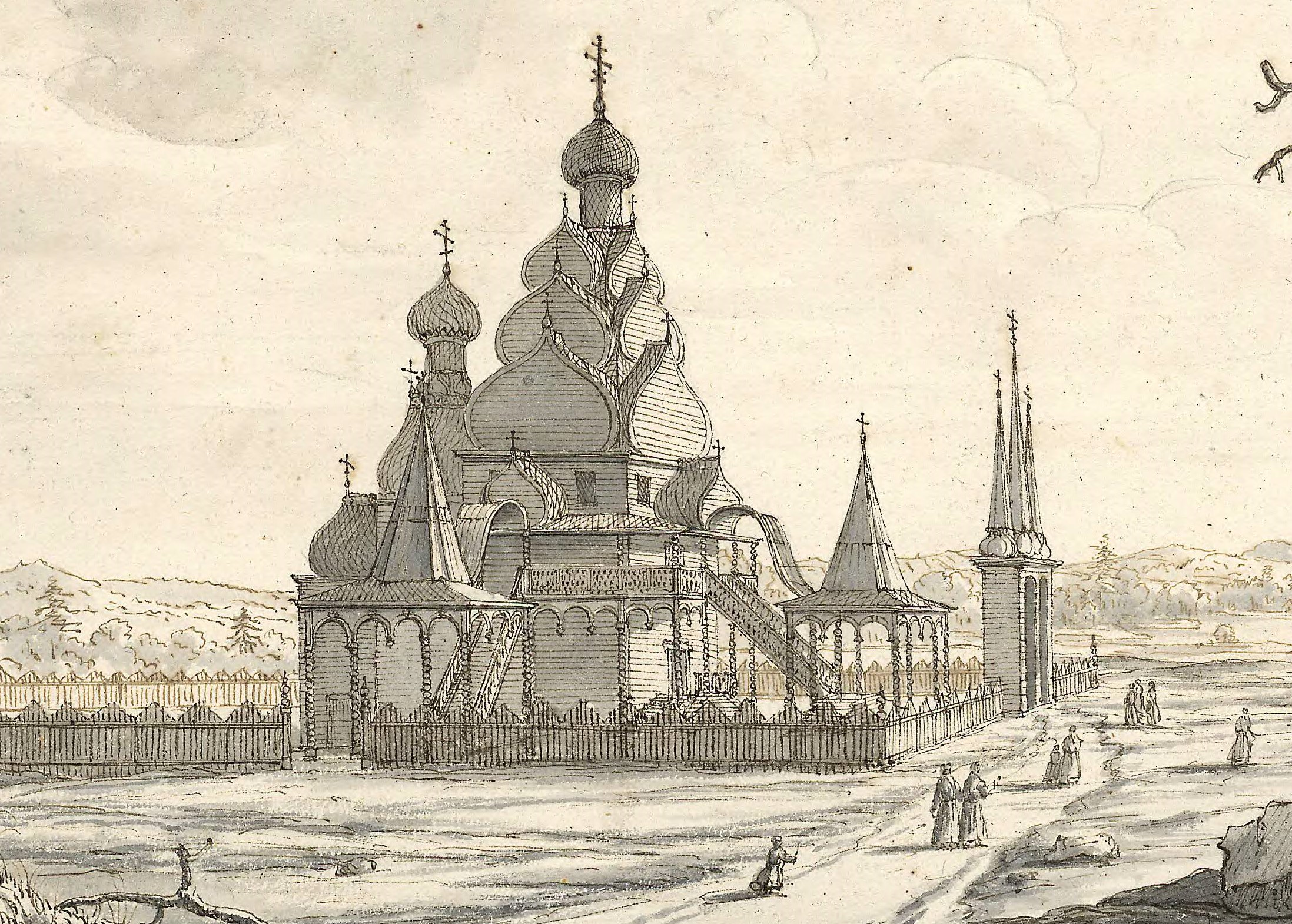 Николо-Угрешский монастырь в XVII столетии.